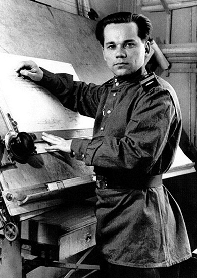 Старший сержант Михаил Калашников в период работы на полигоне НИПСМВО